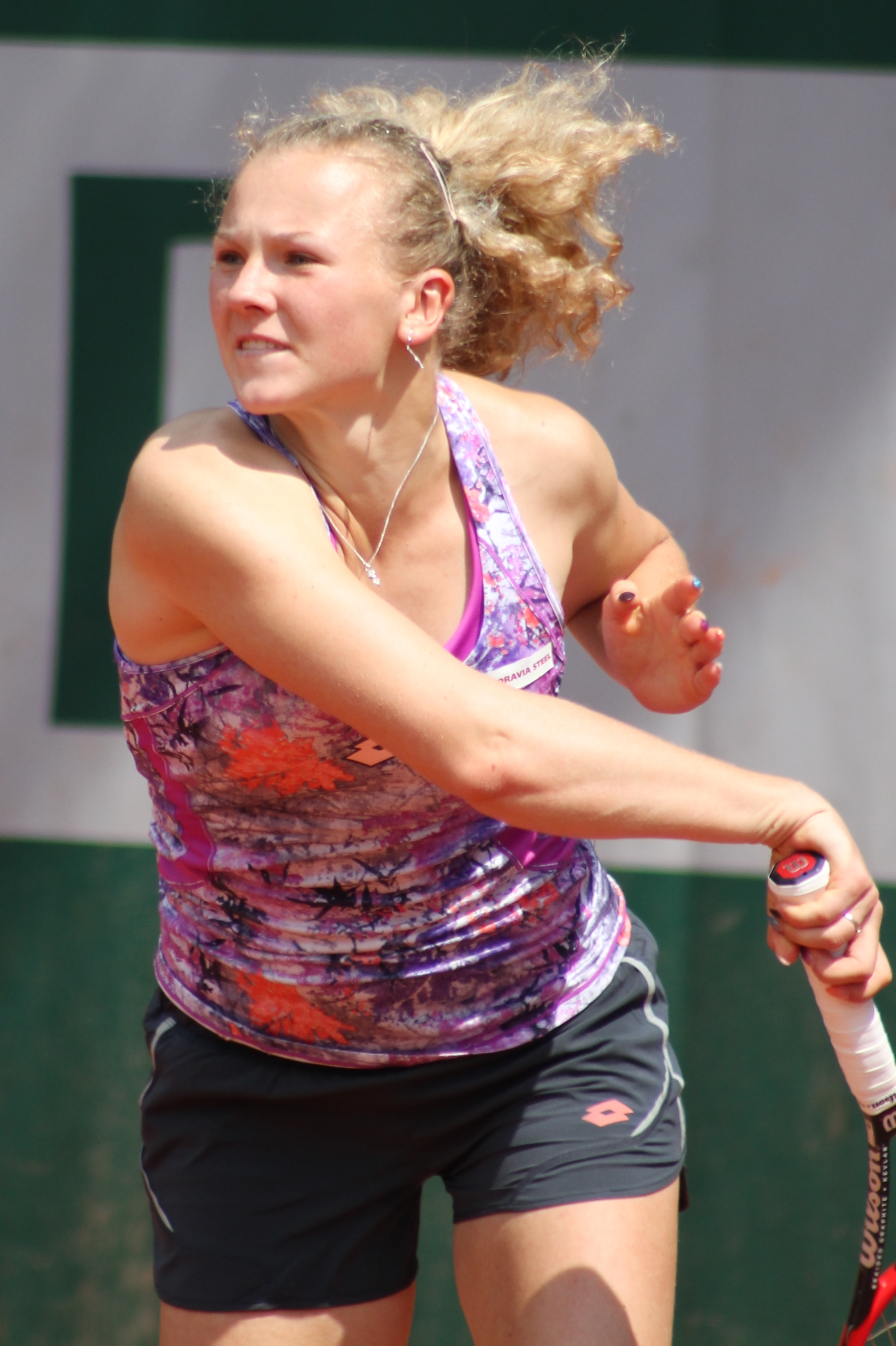 Kateřina Siniaková RG16 (7)